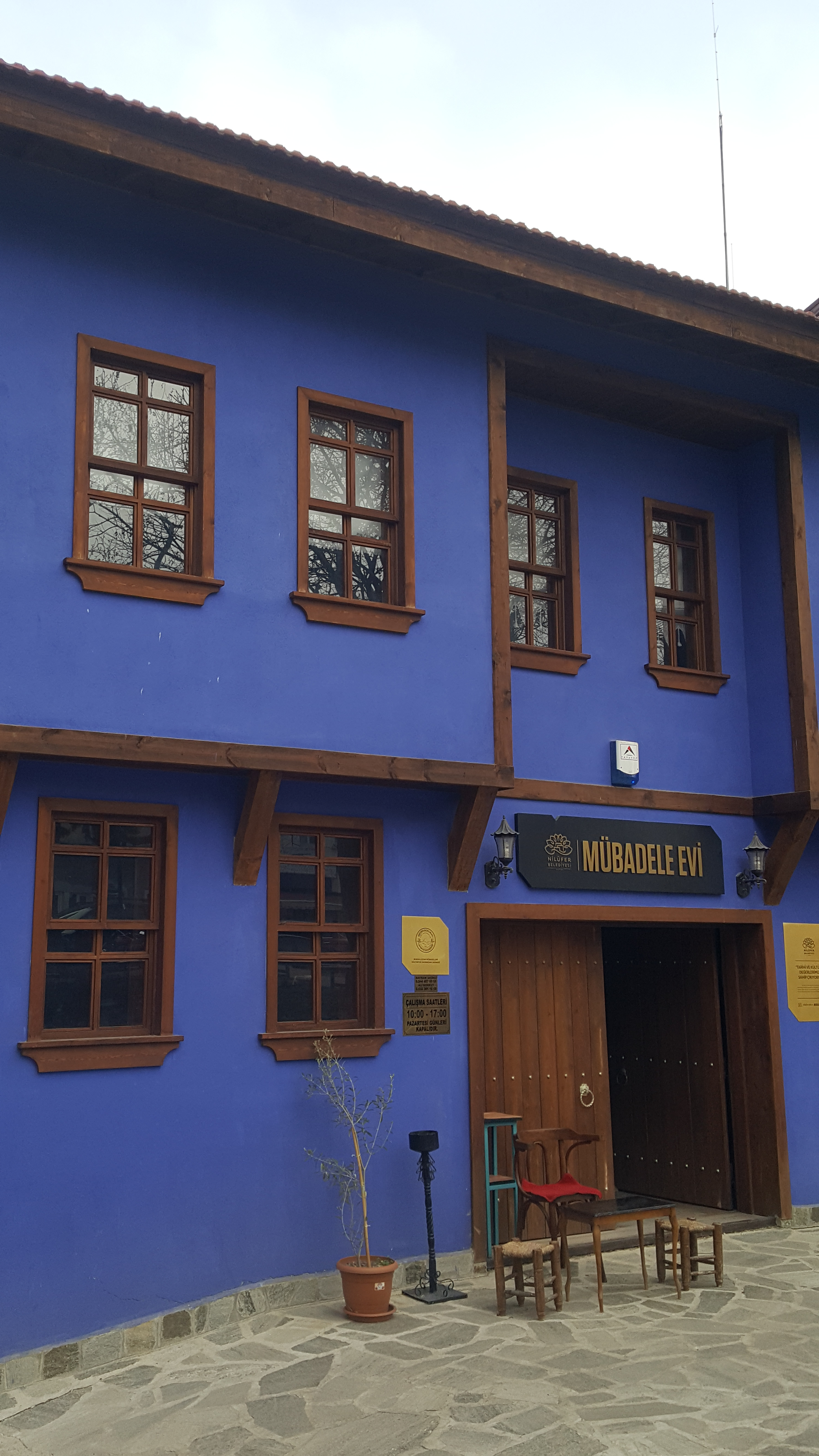 Mübadele Evi, Görükle, Bursa